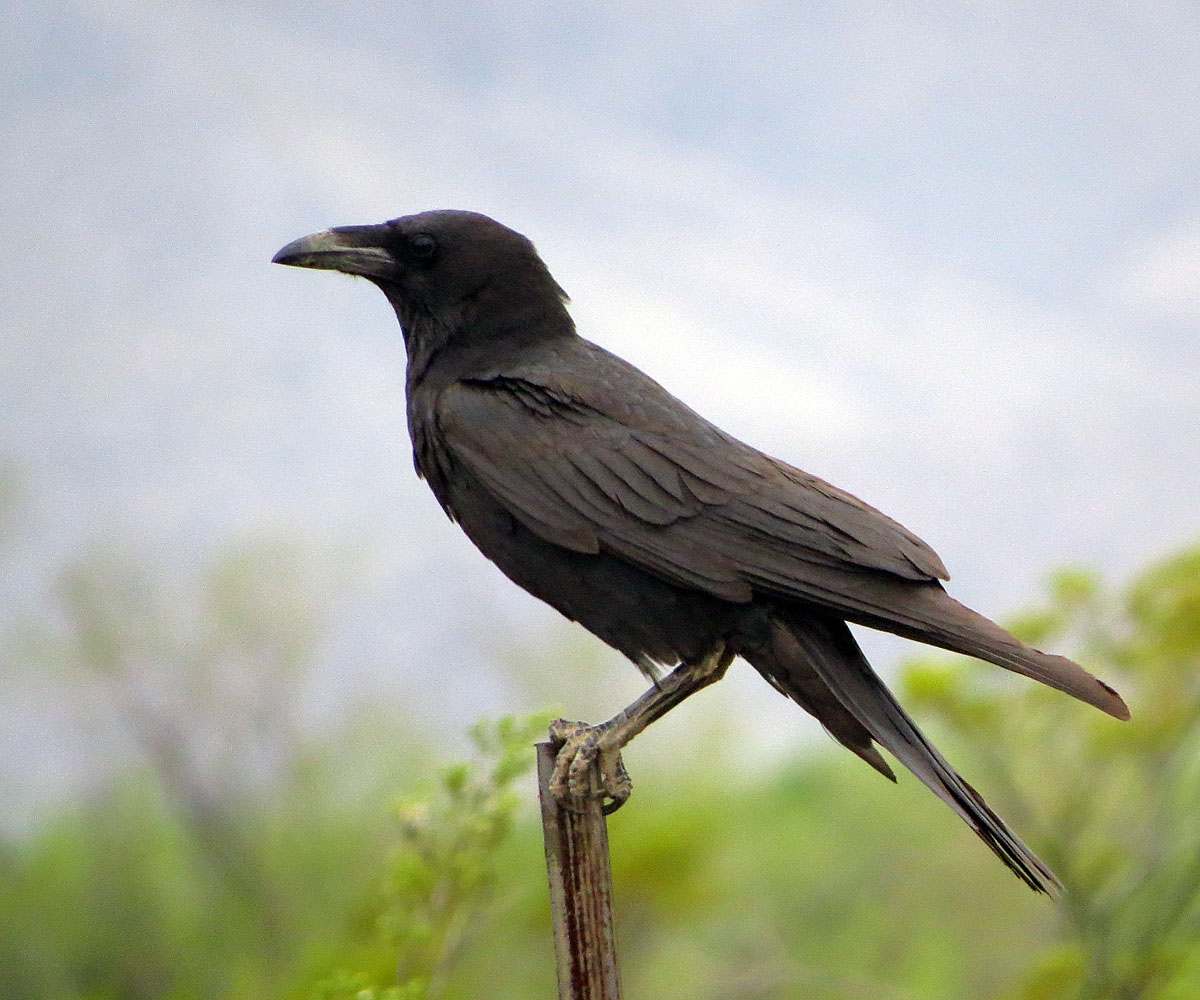 Corvus cryptoleucus 13 may 15 Sierra Vista, AZ